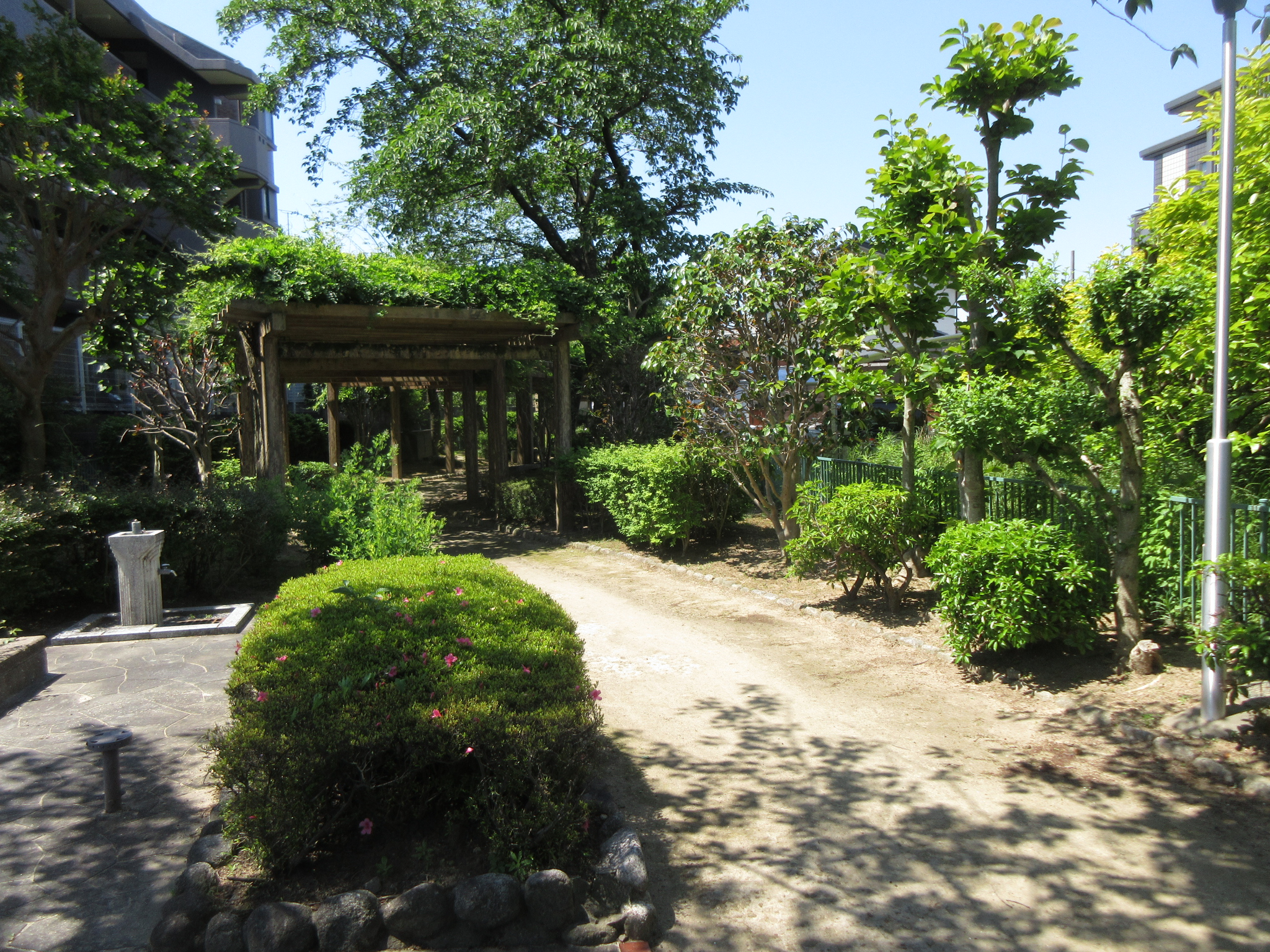 馬頭緑道（岡崎市緑丘）